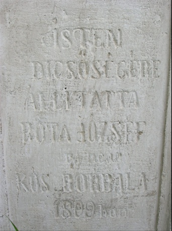 Kétszáz éves ostorosi kőkereszt felirata